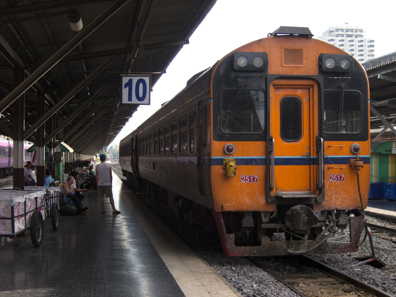 Hualamphong Train Station, central Bangkok.